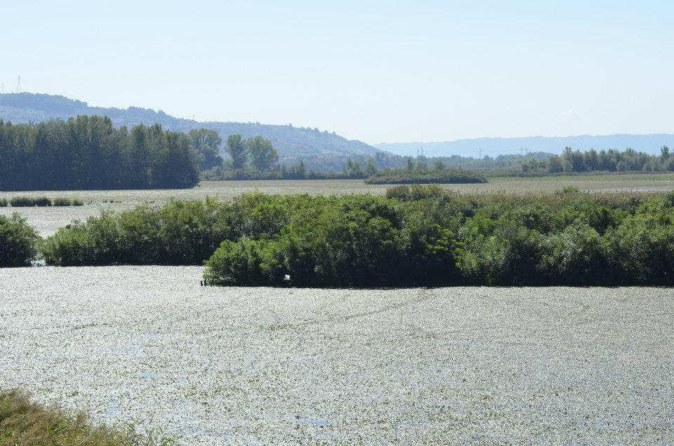 isola This is a photo of a monument which is part of cultural heritage of Italy. The authorisation for taking photos of this object was provided by the World Wide Fund for Nature Italy.